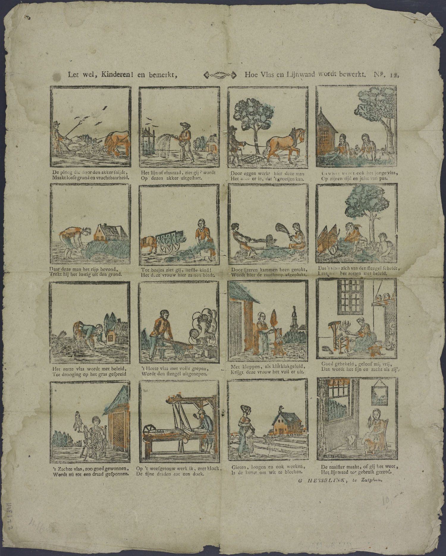 Centsprent met 4 x 4 omkaderde houtsneden, met afbeeldingen van ploegen, vlaszaad zaaien, eggen, wieden, oogsten (uittrekken), tot bosjes binden, met ijzeren kammen de zaadknoppen eraf halen, stengels laten rotten, drogen van het vlas, verhitten en uit de stengels knijpen, het vuil er uit kloppen, hekelen om het zacht te maken, spinnen, weven, bleken en naaien van het lijnwaad. Bevat tweeregelige rijmende onderschriften.